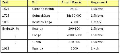 Wert der Kaurischnecke (nach Quelle: Schilder 1952, S. 45